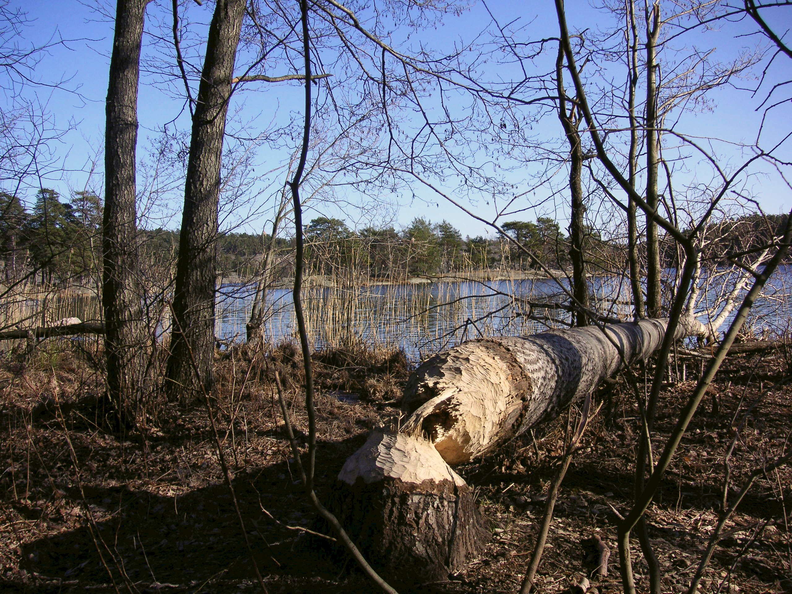 Källtorpssjön i Nacka, bävergnag.